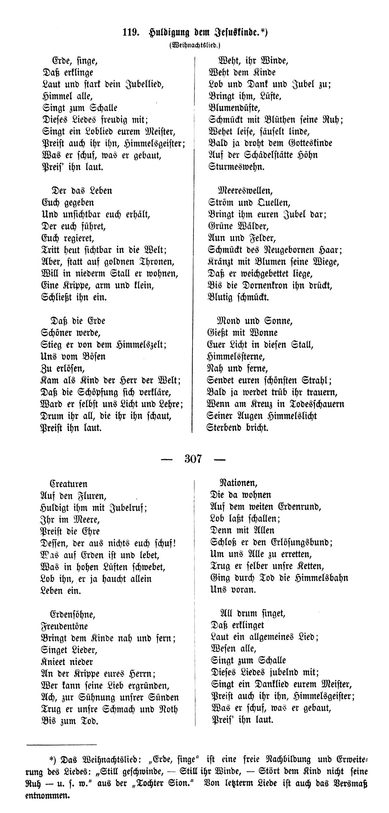 Johannes von Geissel: Erde, singe, zehnstrophige Version (Weihnachtslied), Druck 1869